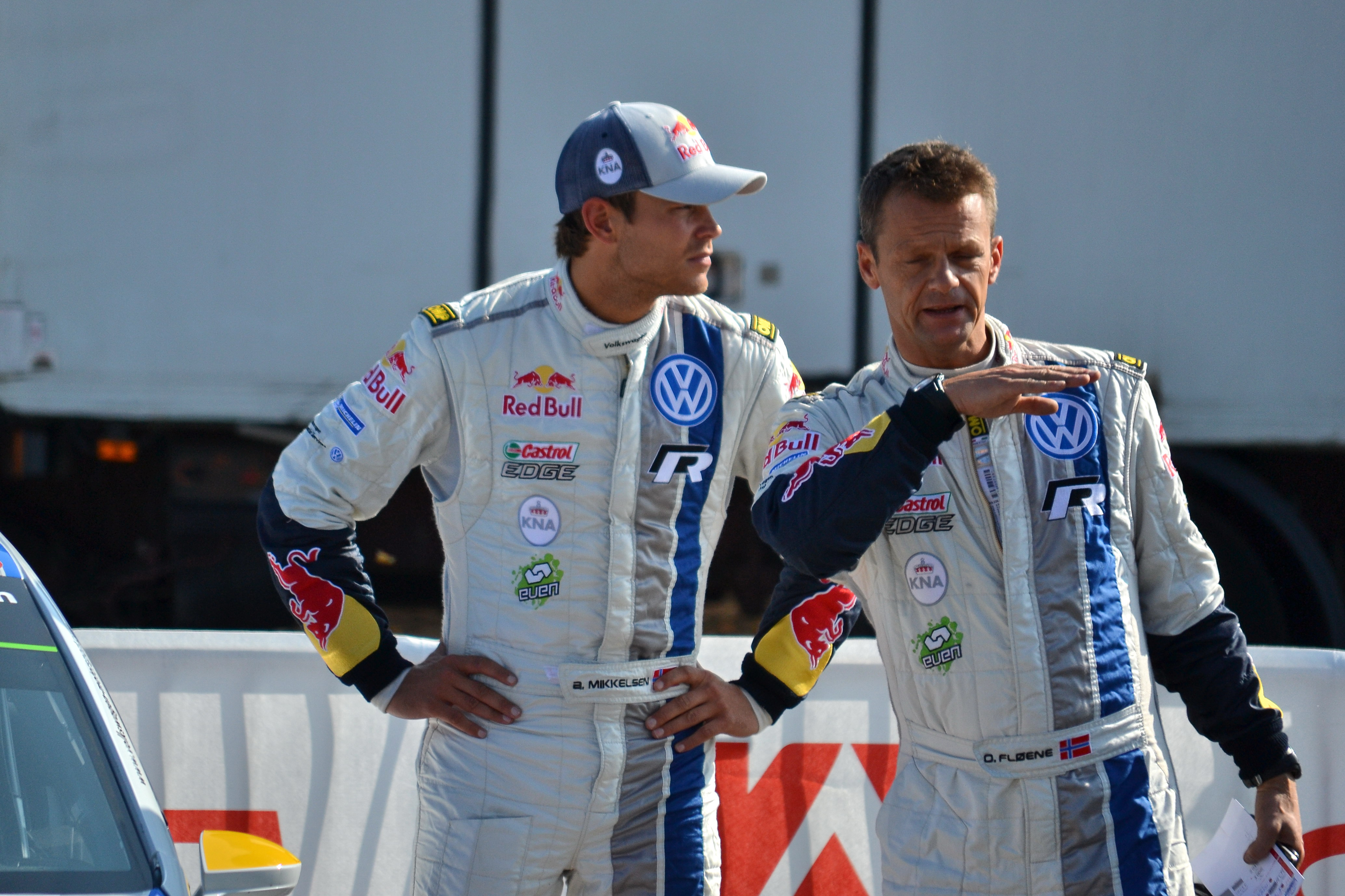 Andreas Mikkelsen et Ola Fløene au parc d'assistance de Colmar durant le Rallye de France-Alsace 2014.